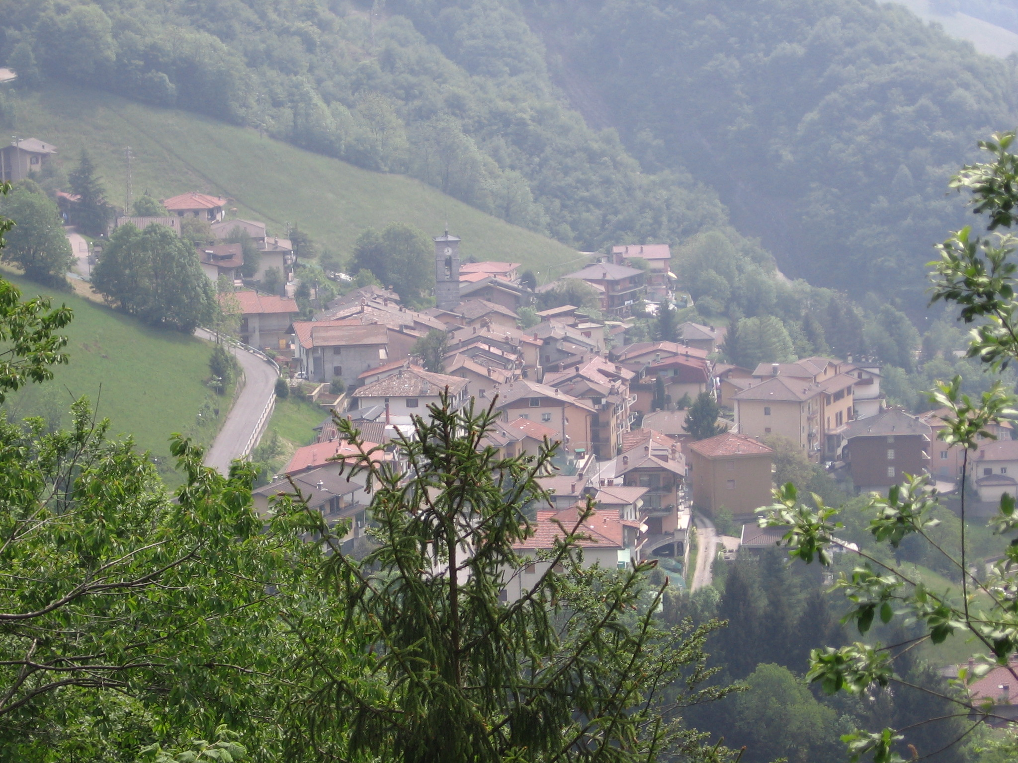 Oneta, Bergamo, Italia